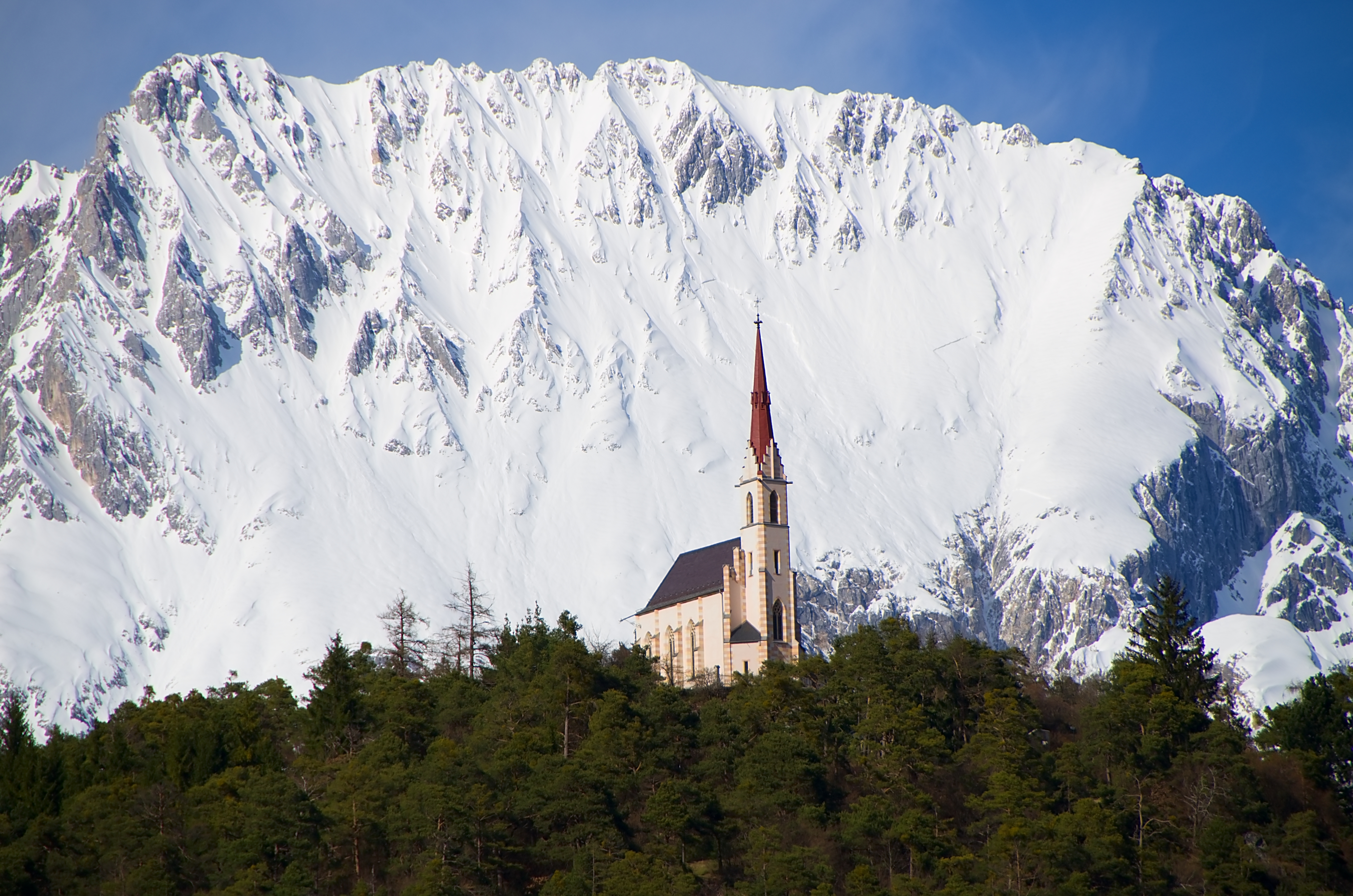 Kościół pielgrzymkowy w Locherboden, Tyrol, Austria.